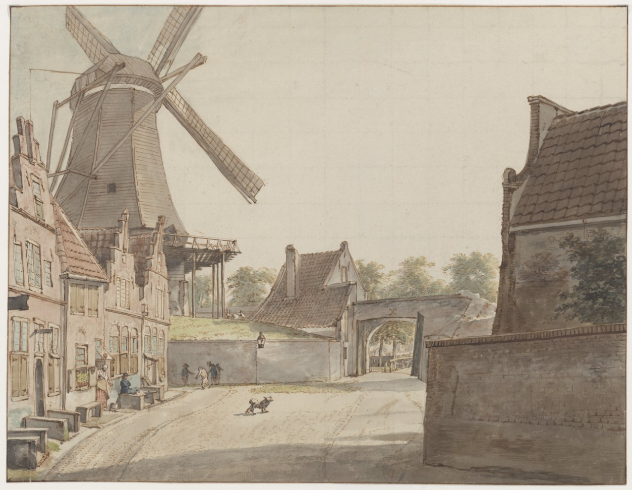 Raampoort, oostzijde, met Doelmolen en Bereiderstraat (Sophiastraat). "Schets aan de Raampoort te Haarlem". Aquarel van Wybrand Hendriks, ca.1800. h.32,5, br.42 cm. Herkomst: onbekend. Identificatienummer: 53-002172 G pen in zwart en penseel in kleuren